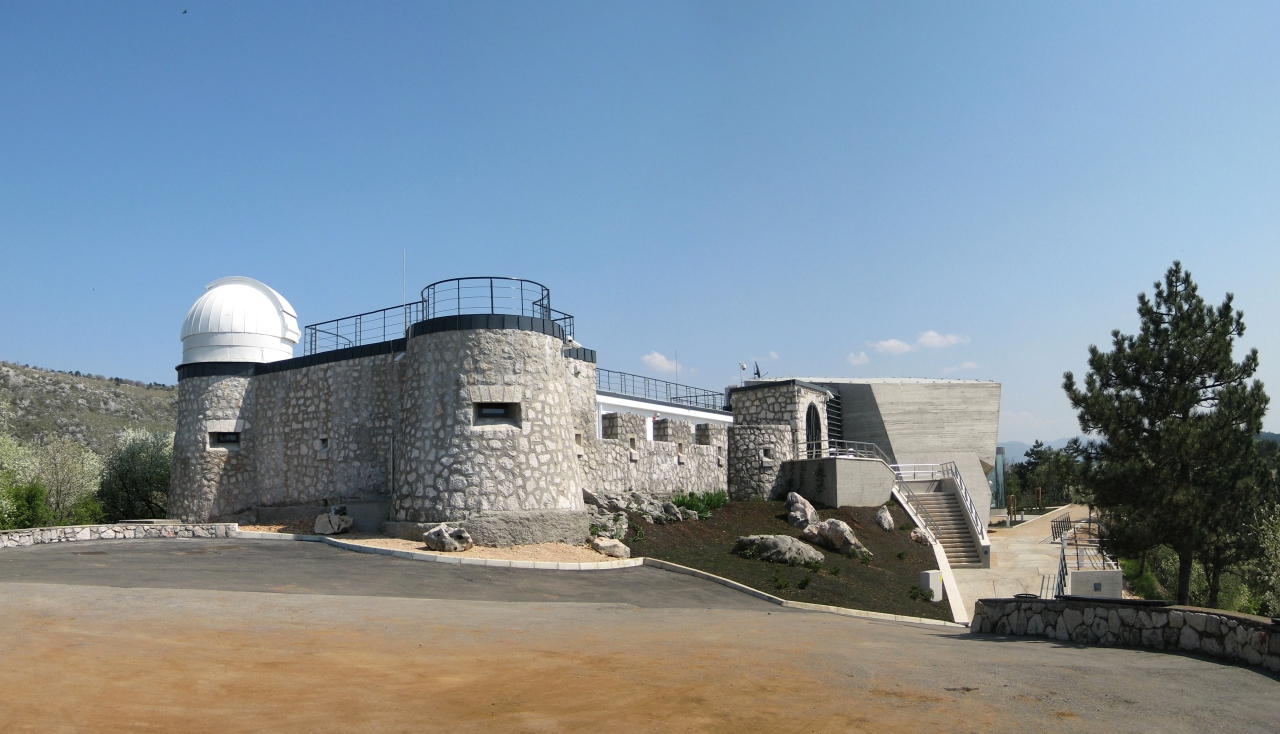 Astronomski centar u Rijeci na brdu Sveti Križ. Dana 18. svibnja 2001. godine članovi Akademskog astronomskog društva Rijeka, astronomi amateri i građani, dobili su Riječku zvjezdarnicu.